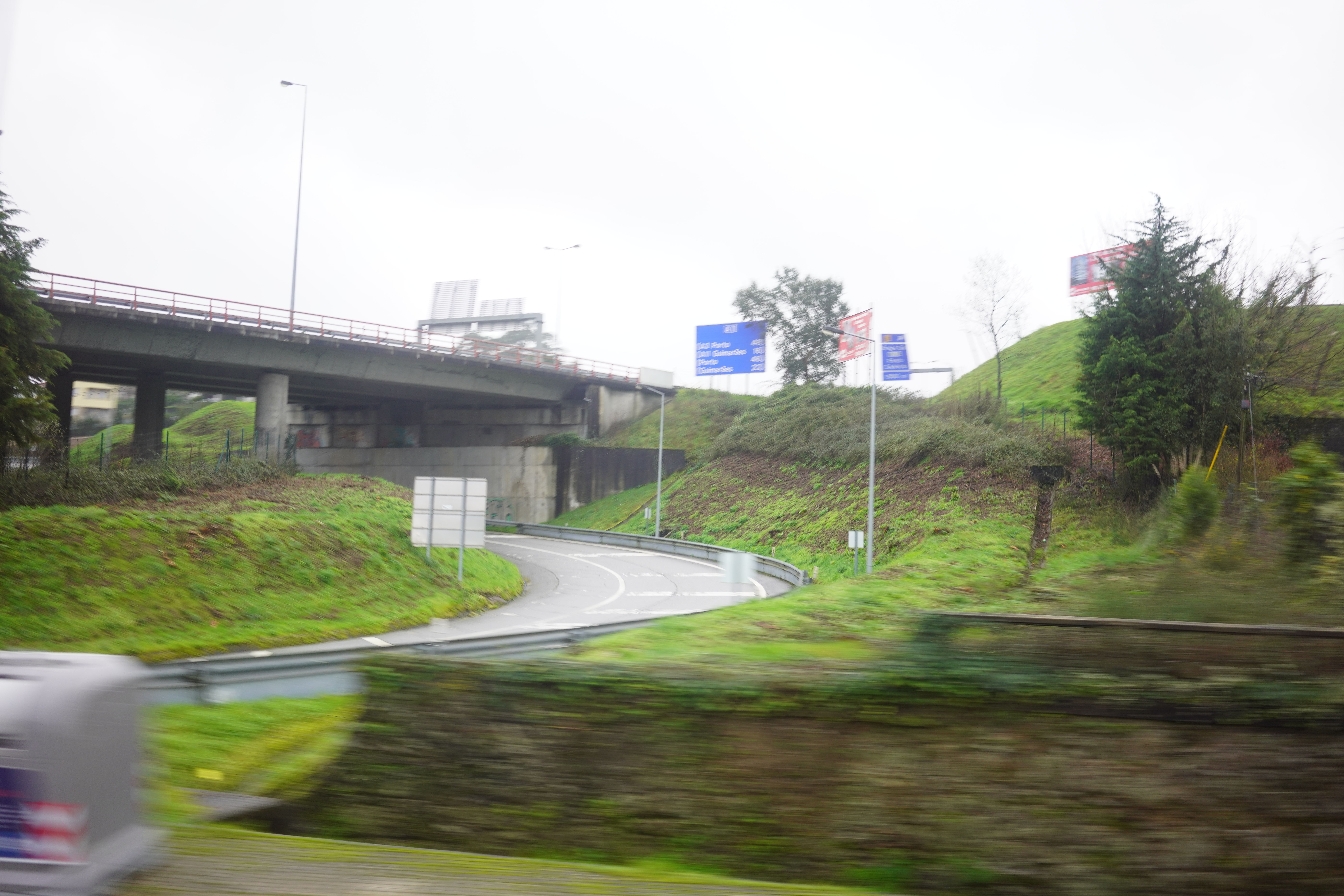 20200201_BragaSub_4323